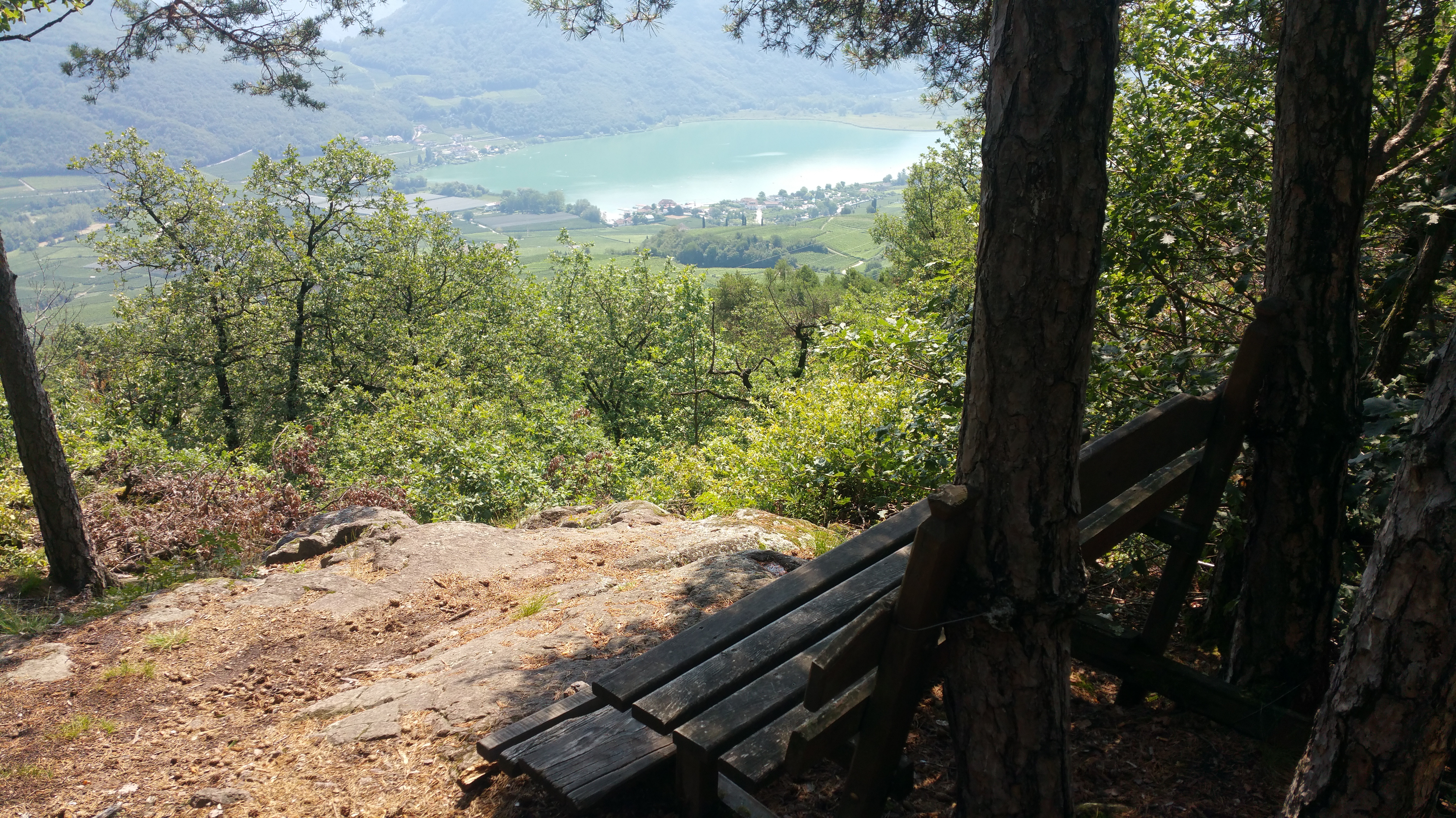 Blick auf den Kalterer See vom Aussichtspunkt "Klotzbankl" im Altenburger Wald